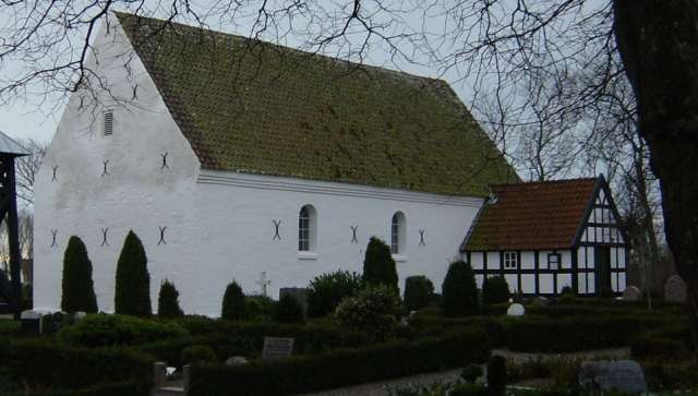 Asdal Kirke i Asdal Sogn.